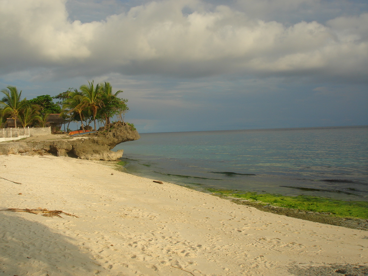 Beach in Anda, Bohol